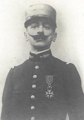 Photo de Pierre Labordère MPLF